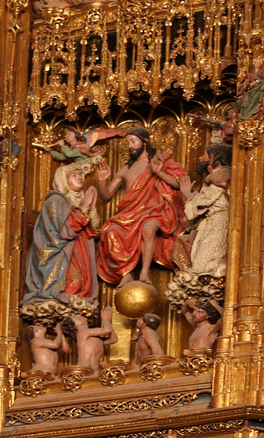 Detalle del Juicio Final del retablo mayor de la Catedral de Toledo (España)